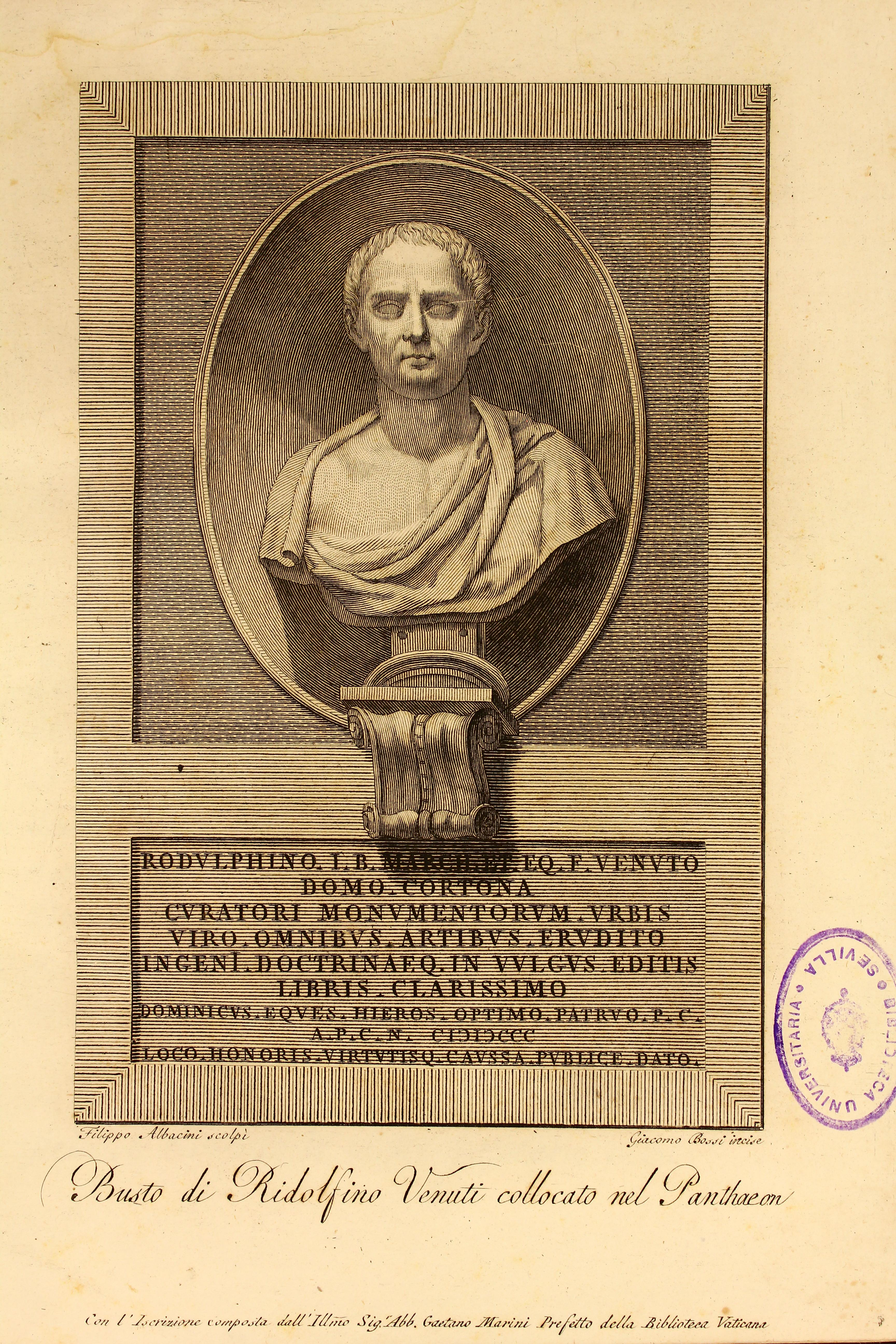 Autor: Venuti, Ridolfino, 1705-1763 Descripción bibliográfica: Accurata e succinta descrizione topografica delle antichita di Roma / Ridolfino Venuti Cortonese. - 3ª ed. - Roma: [s.n.], 1824 (presso Pietro Piale e Mariano de Romanis). - v. ; 26 cm. - T. 1 -- T. 2. - Contiene grab. por todo el texto Materia: Ciudades antiguas Materia: Roma - Descripciones Materia: Roma - Historia Localización: Libro completo